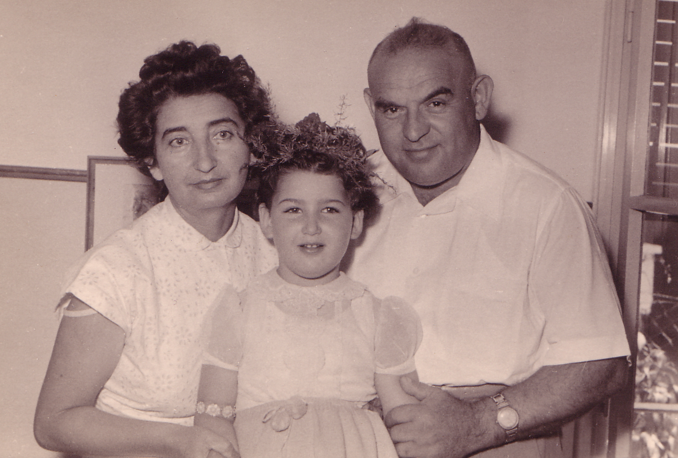 מלכה ברוורמן עם בעלה הראשון ובתה ליאורה